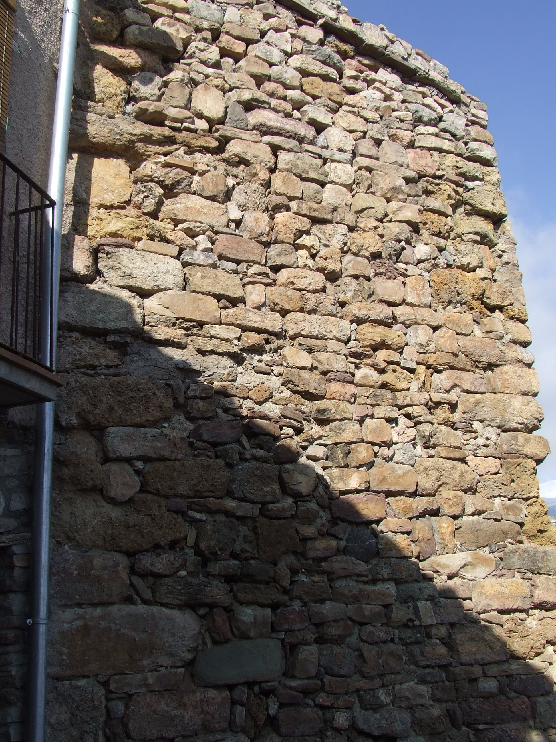 La Torre del Carlà, façana de llevant (Antist, la Pobleta de Bellveí, la Torre de Cabdella, Pallars Jussà)